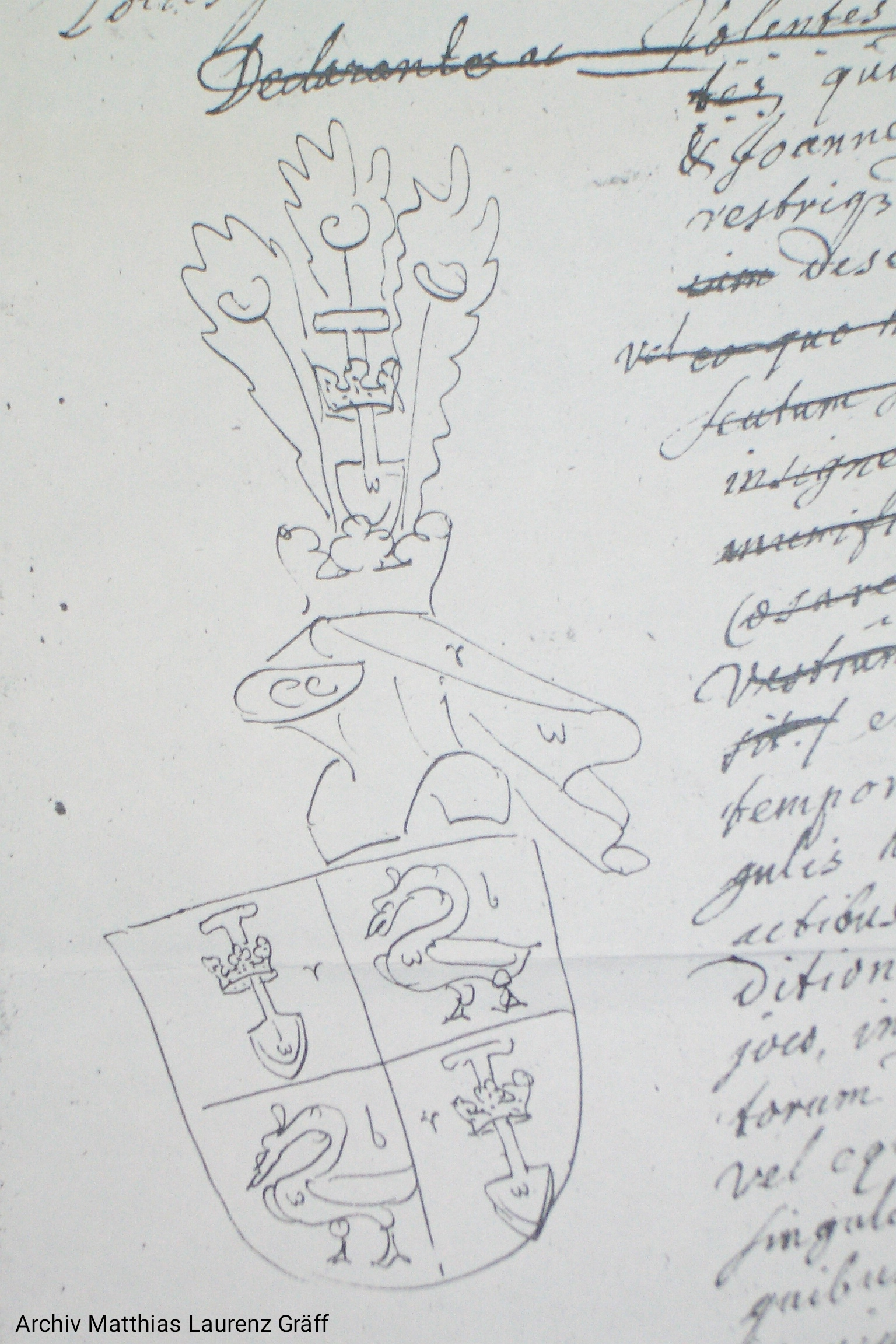 Het wapen van Ridder Andries de Graeff en zijn zoon Cornelis (19 juli 1677). Archiv Familie Gräff, Pater Lambert Graef (Gräf) und Mag. Matthias Laurenz Gräff (Gars am Kamp); Ursprünglich aus dem Österreichischen Staatsarchiv: AT-OeStA/AVA Adel RAA 151.23 Graeff, Andreas de, Bürgermeister zu Amsterdam, Verleihung des Reichsritterstandes, „Edler Herr von Graeff, Ritter”, Wappenbesserung, 1677.07.19 (Akt (Sammelakt, Grundzl., Konvolut, Dossier, File))